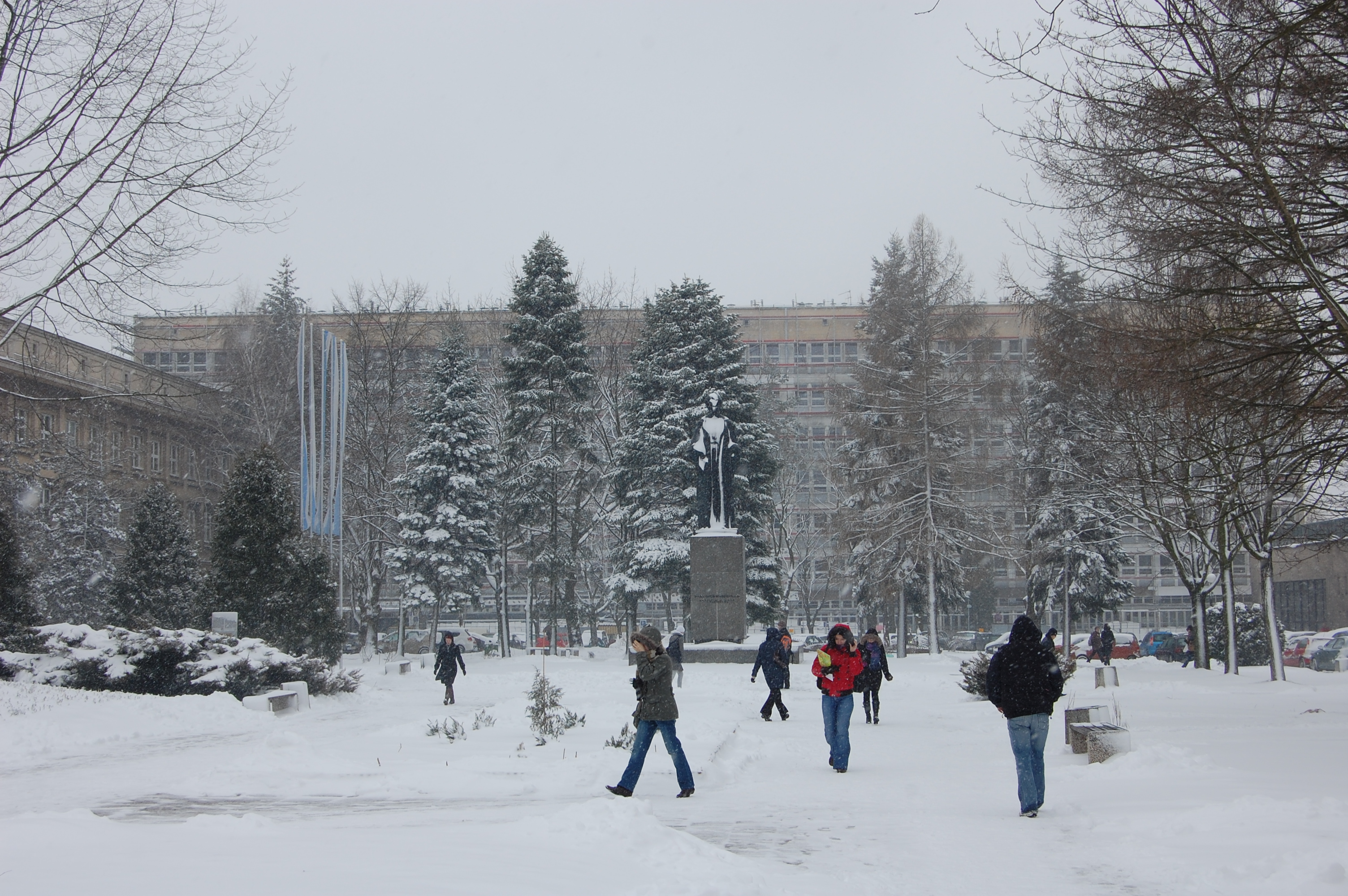 UMCS w Lublinie, pomnik Marii Curie-Skłodowskiej, w głębi Wydział Chemii